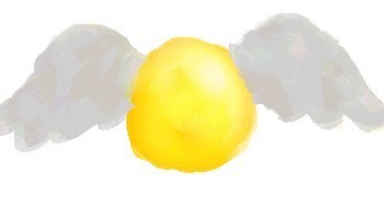 desenho de um pomo de ouro